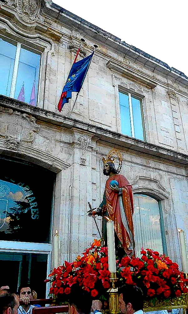 Fernando III el Santo se celebra por el 30 de mayo, y es ocasión de las fiestas mayores de San Fernando de Henares.